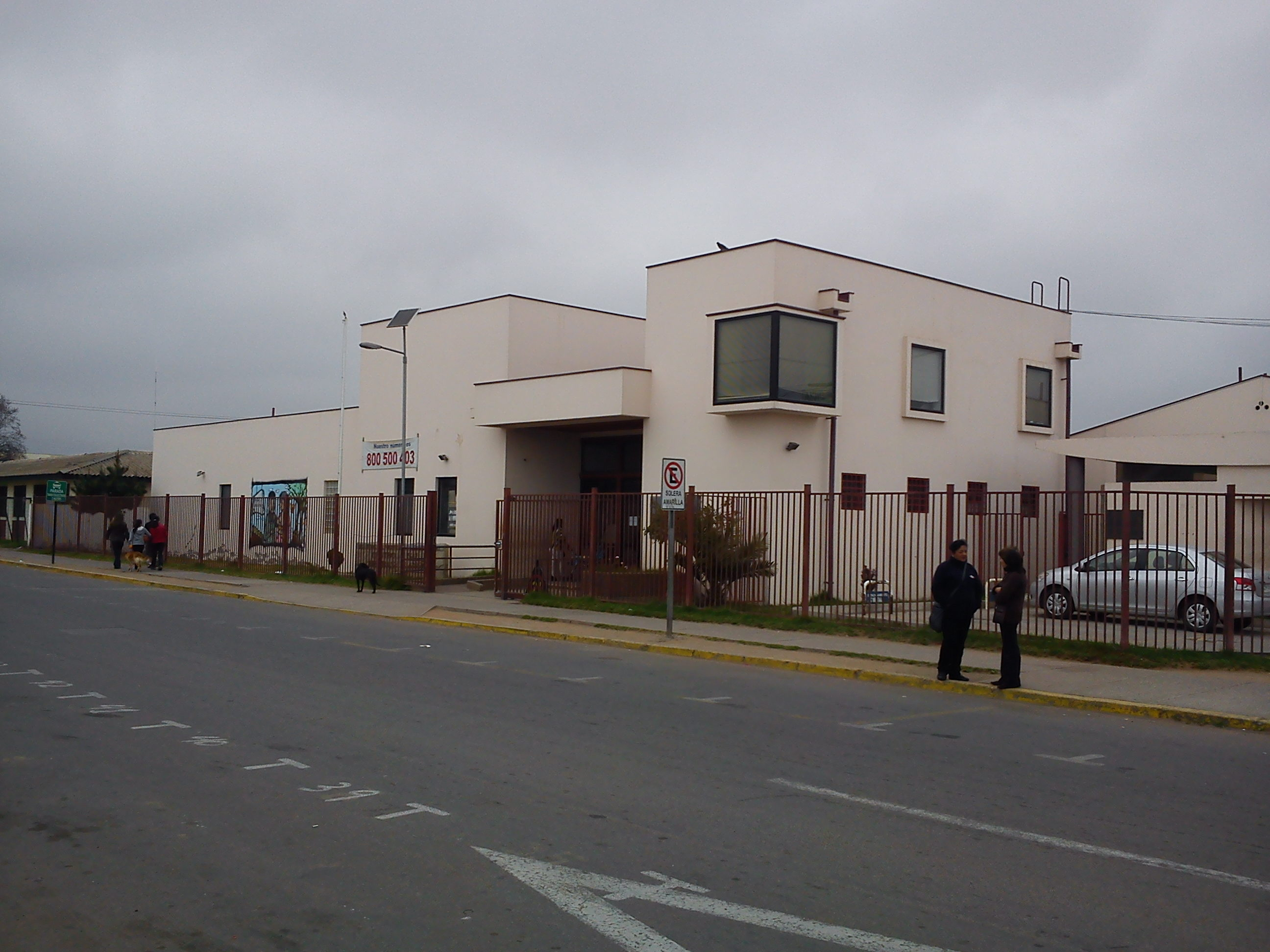 CESFAM